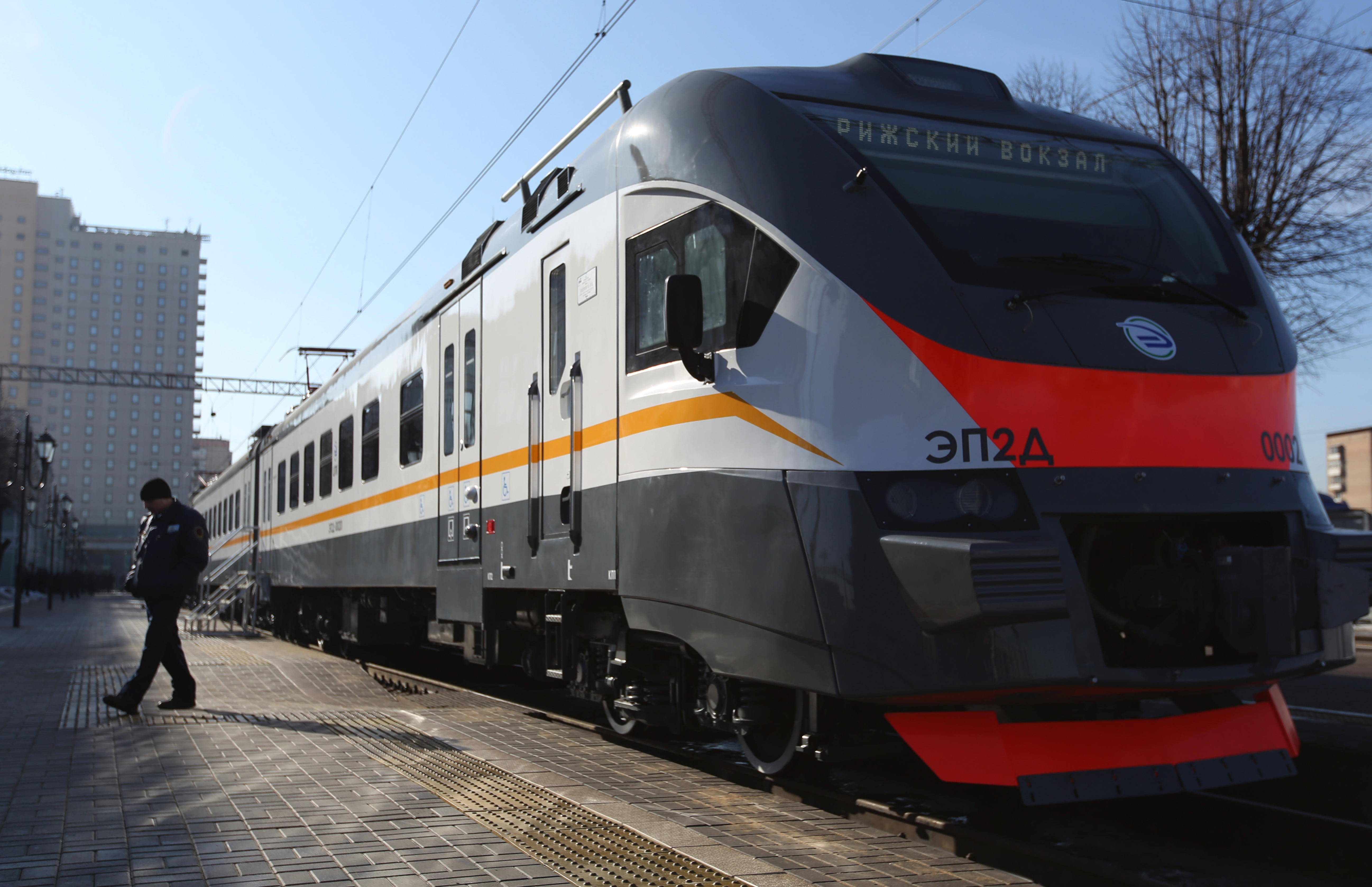 Электропоезд ЭП2Д-0002 на Рижском вокзале Москвы